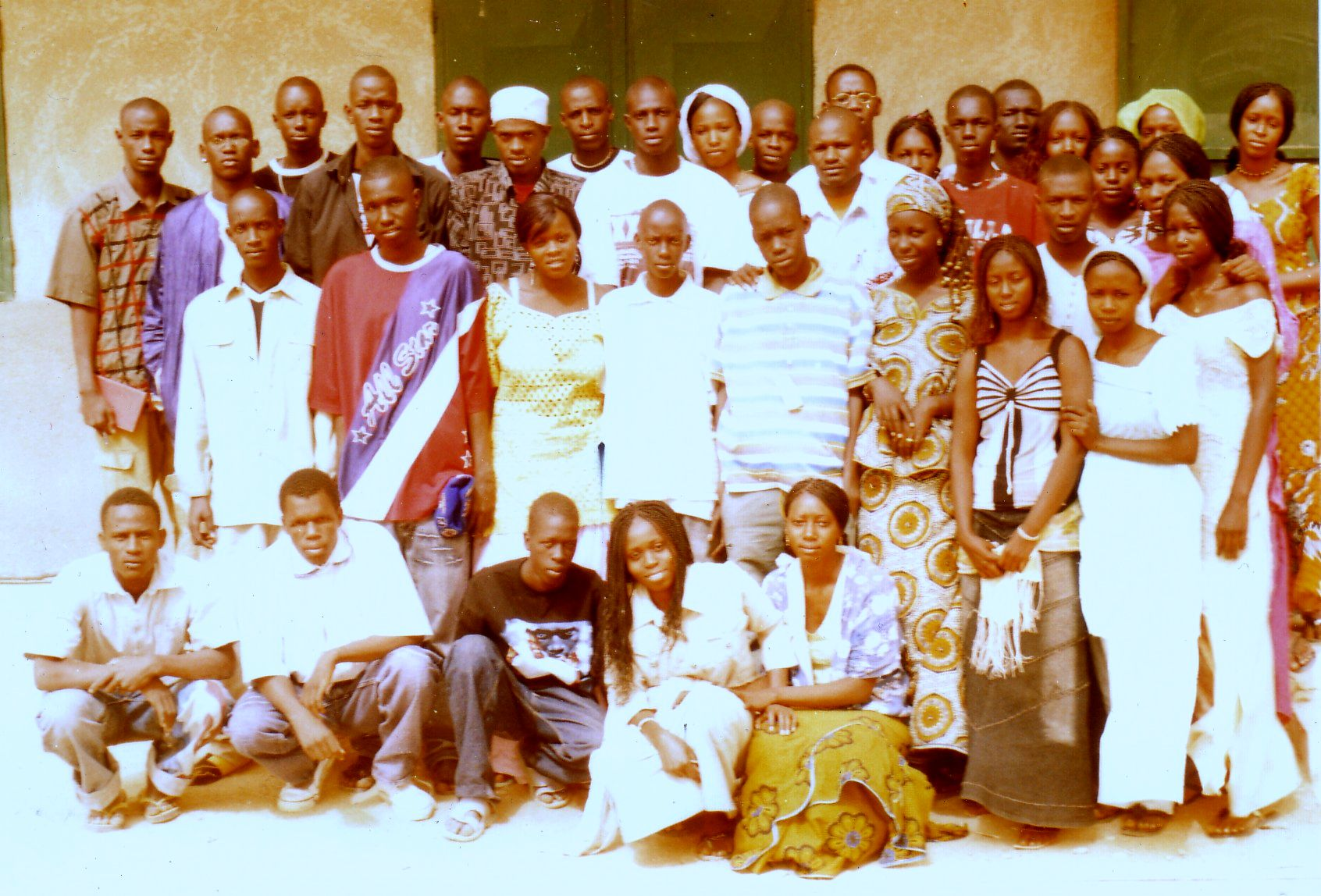 Photo prise le 02 Janvier 2007 à l'école élémentaire de Agnam-Goly (Sénégal) au sortir de l'Assemblée générale annuelle de l'AEERAG.